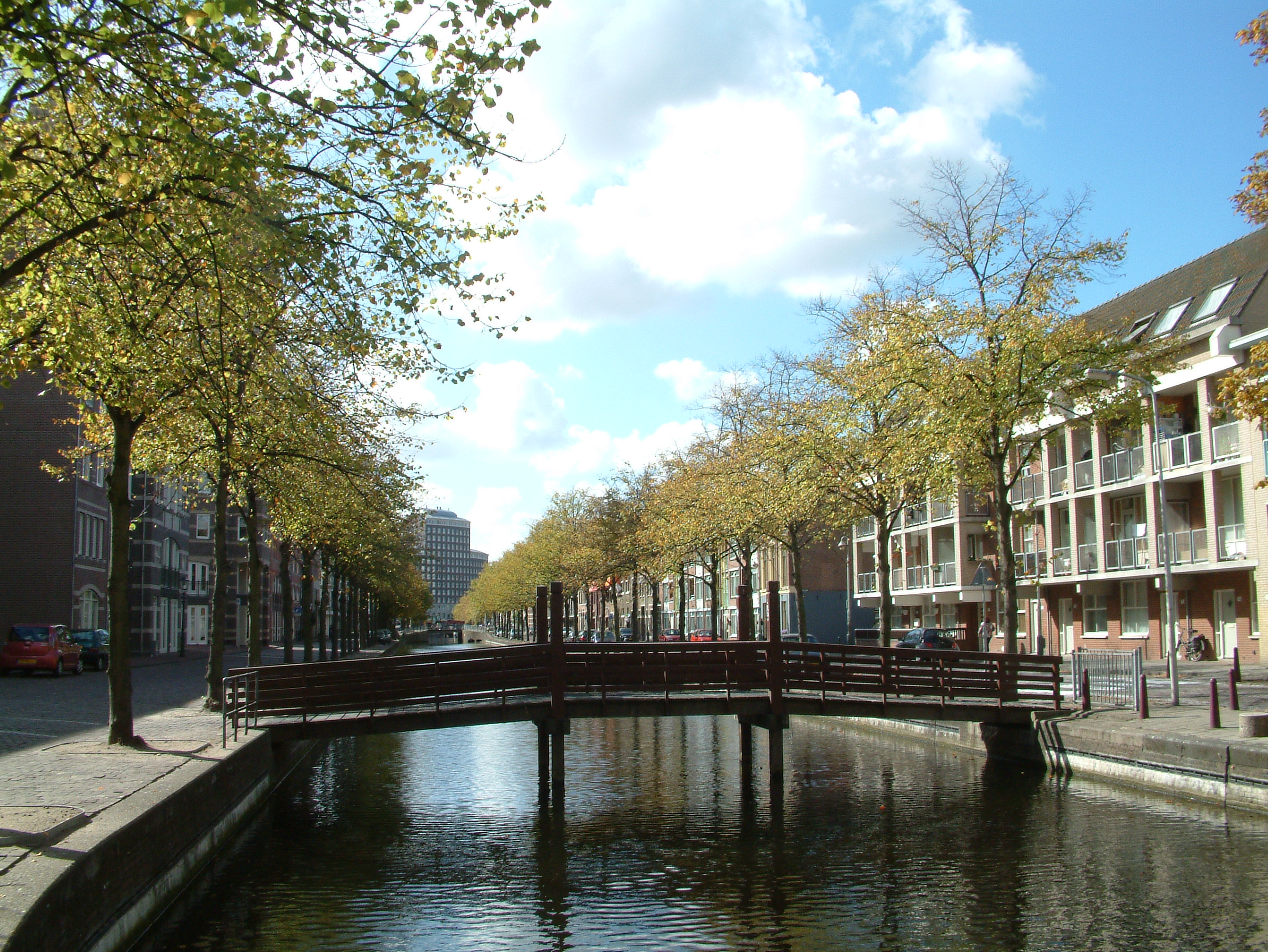 Brug in Den Haag